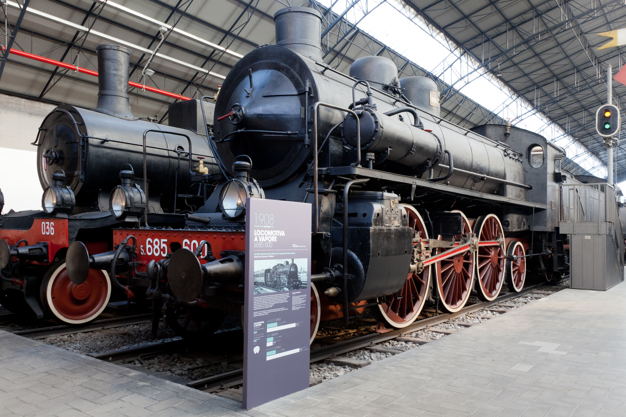 Locomotiva a vapore GRS685, esposta al Museo nazionale della scienza e della tecnologia Leonardo da Vinci, Milano.